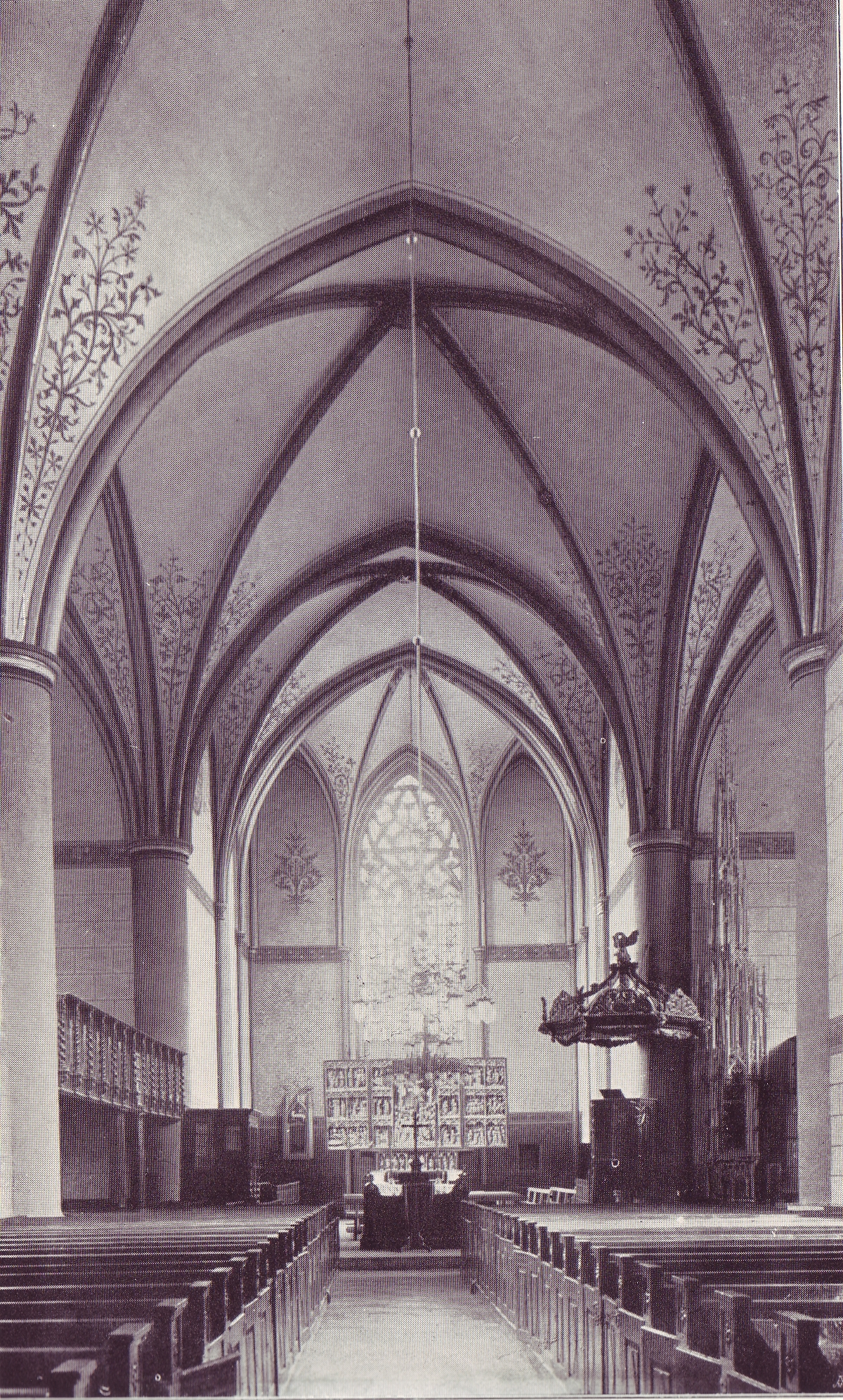 Stiftskirche Schildesche